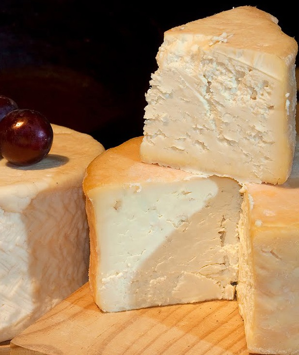 Queso Genestoso